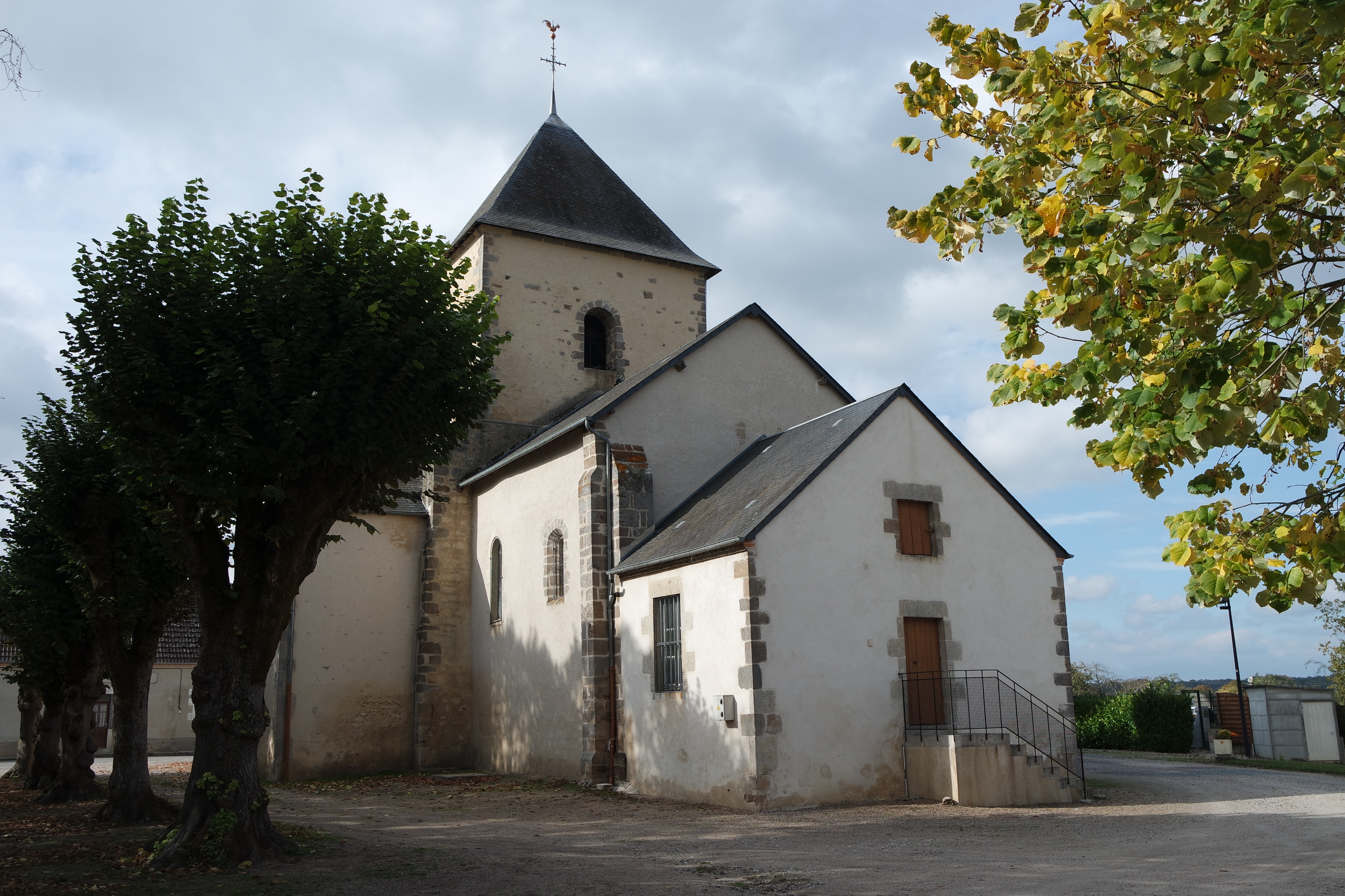 Église Saint-Martin (XIIe-XIIIe siècle) d'Azy-le-Vif, Nièvre, France.